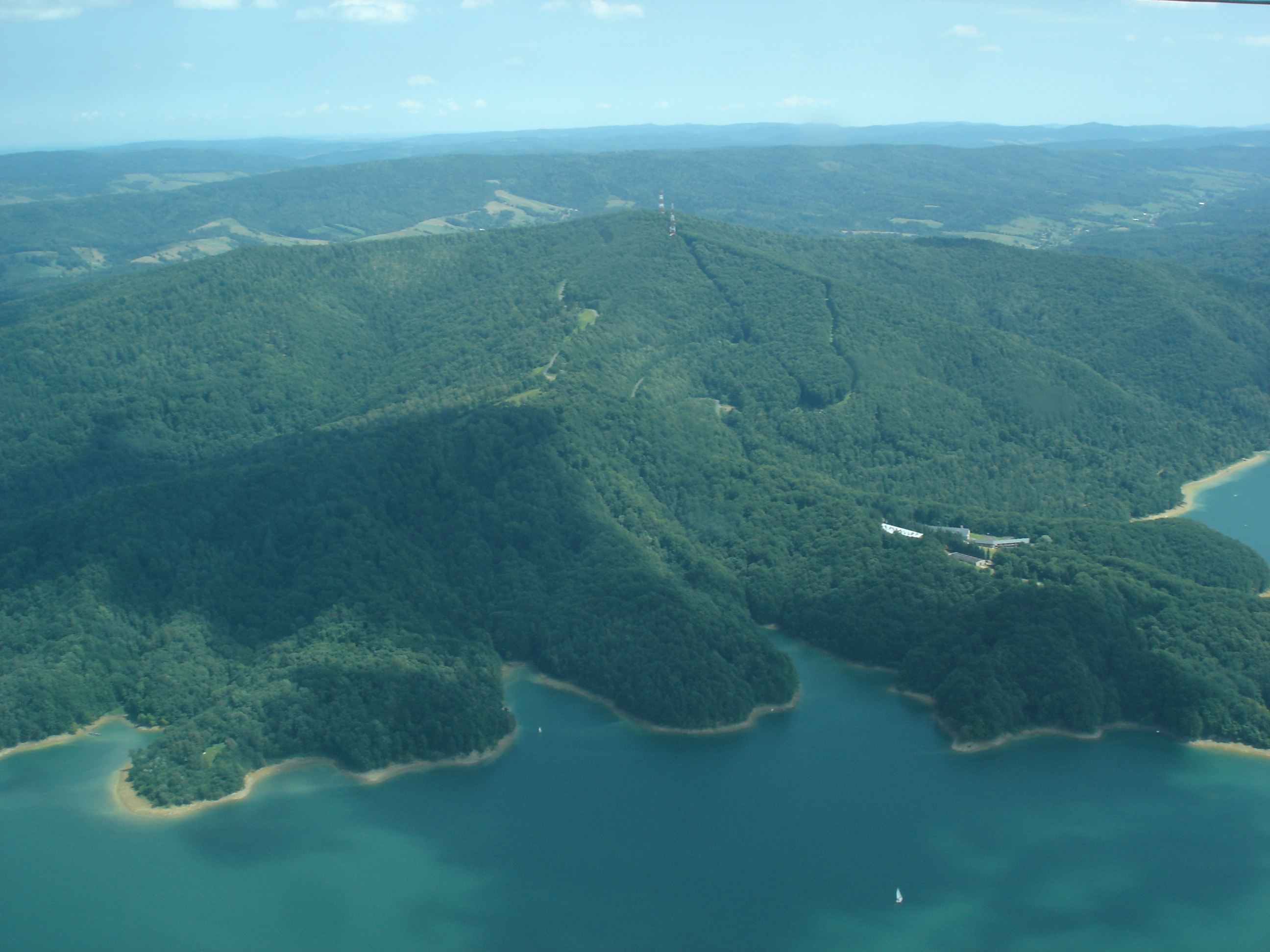 Góra Jawor - Góry Sanocko-Turczyńskie